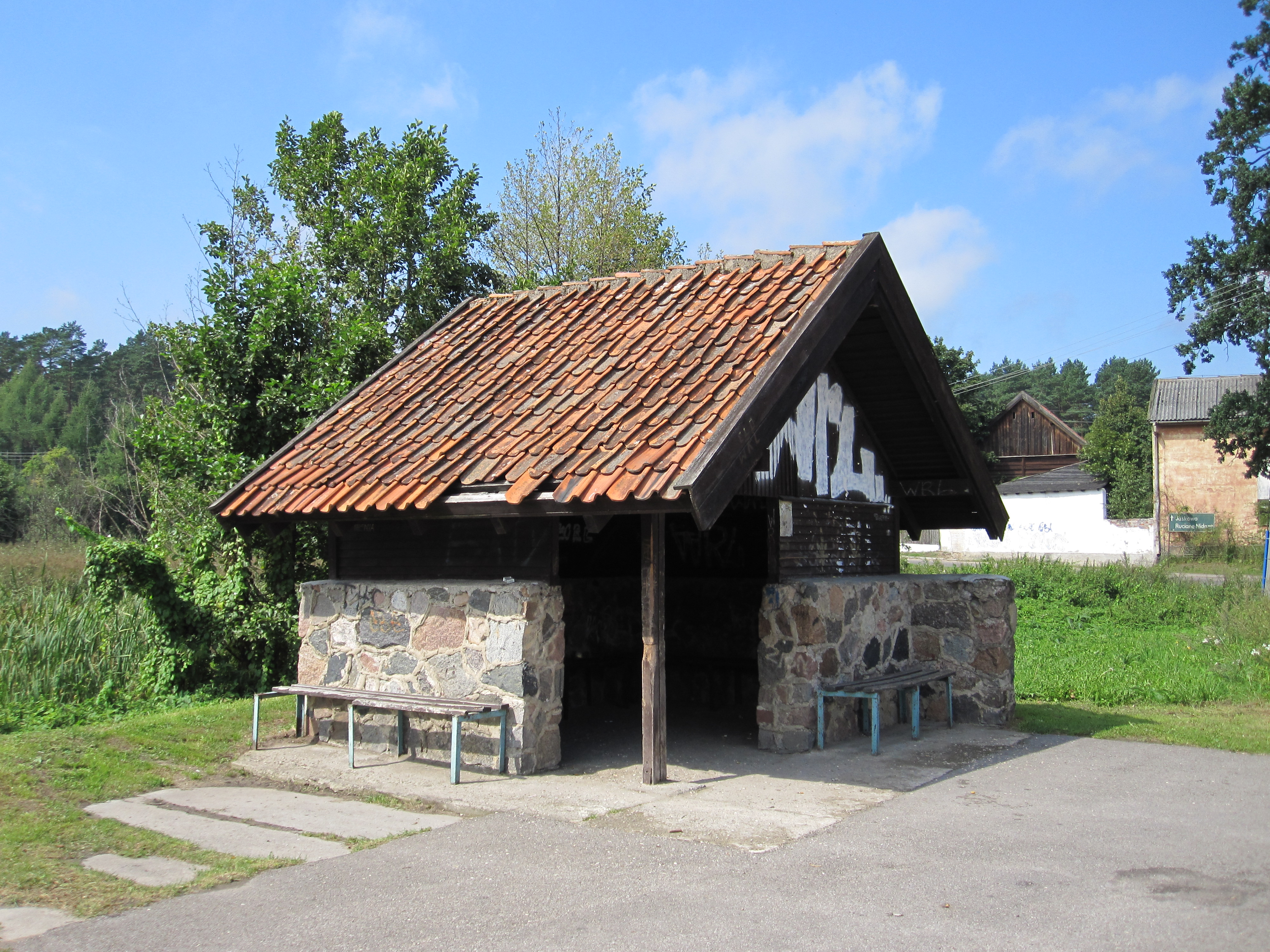 Wiartel - bus stop Wiartel - przystanek autobusowy